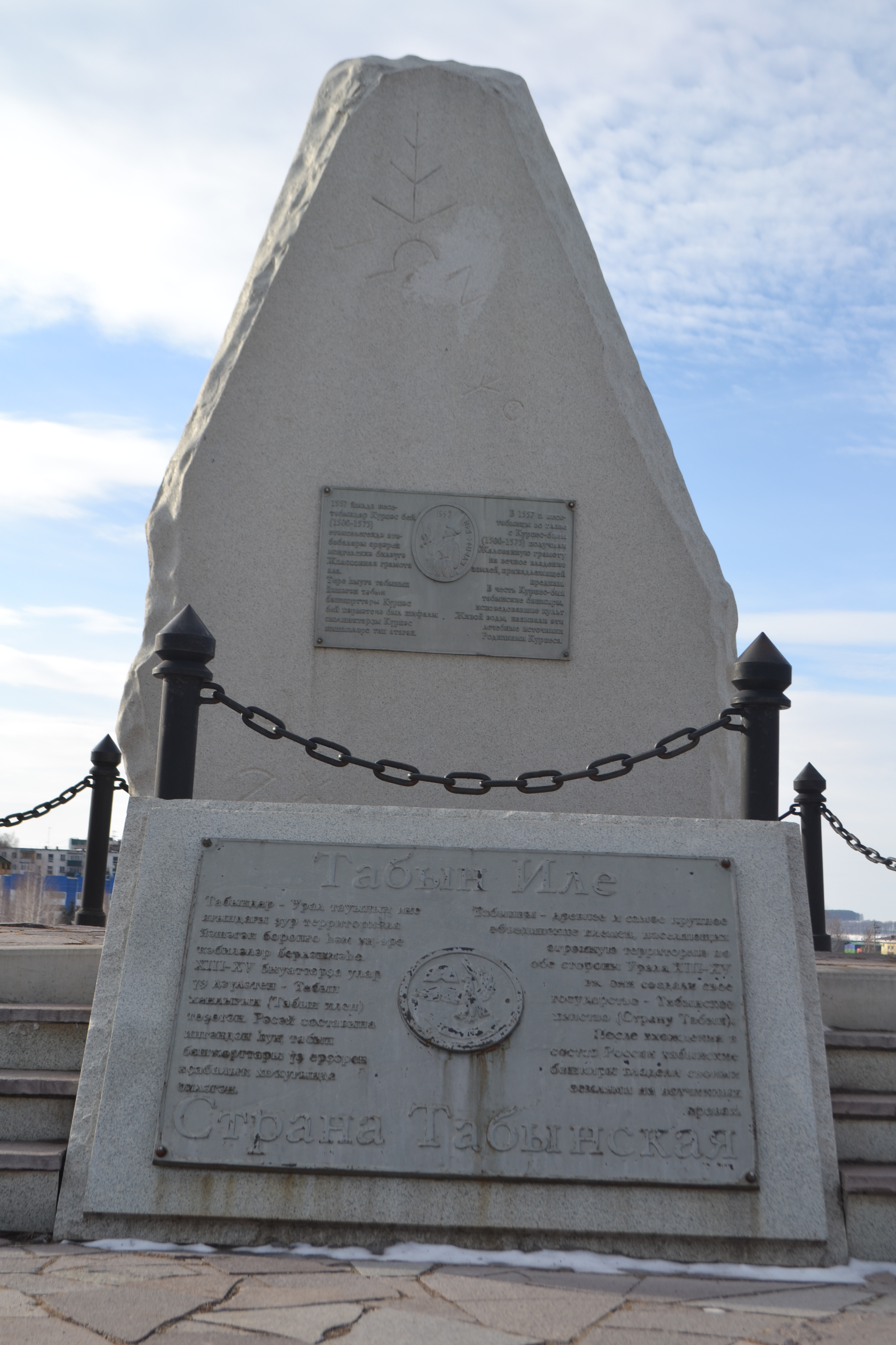 النصب التذكاري لعشيرة الباشكير تابين